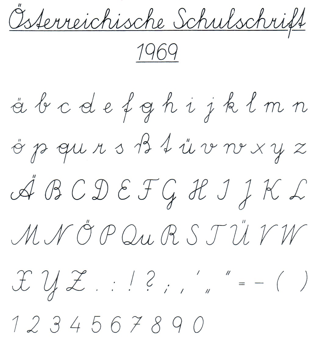 Österreichische Schulschrift 1969-1995